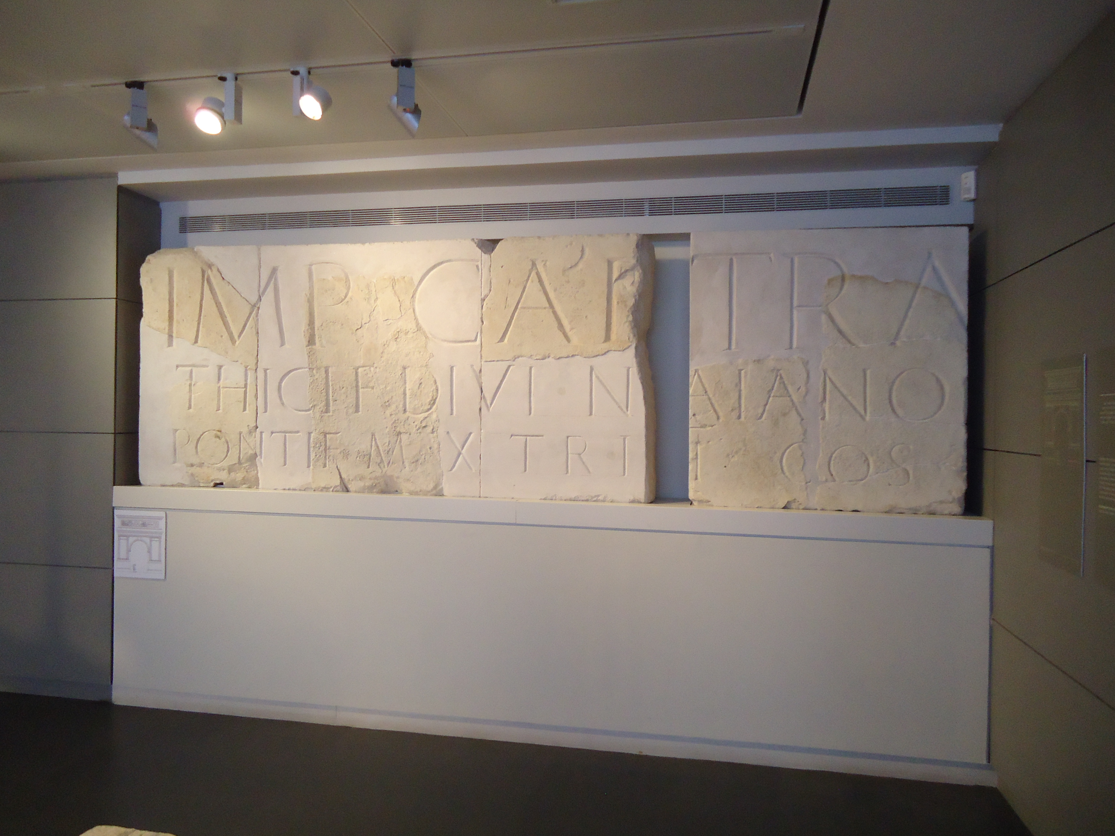 כתובת המוקדשת לקיסר אדריאנוס על ידי הסנאט הרומאי לכבוד ניצחונו ודיכוי מרד בר כוכבא. הכתובת נמצאת כיום במוזיאון ישראל